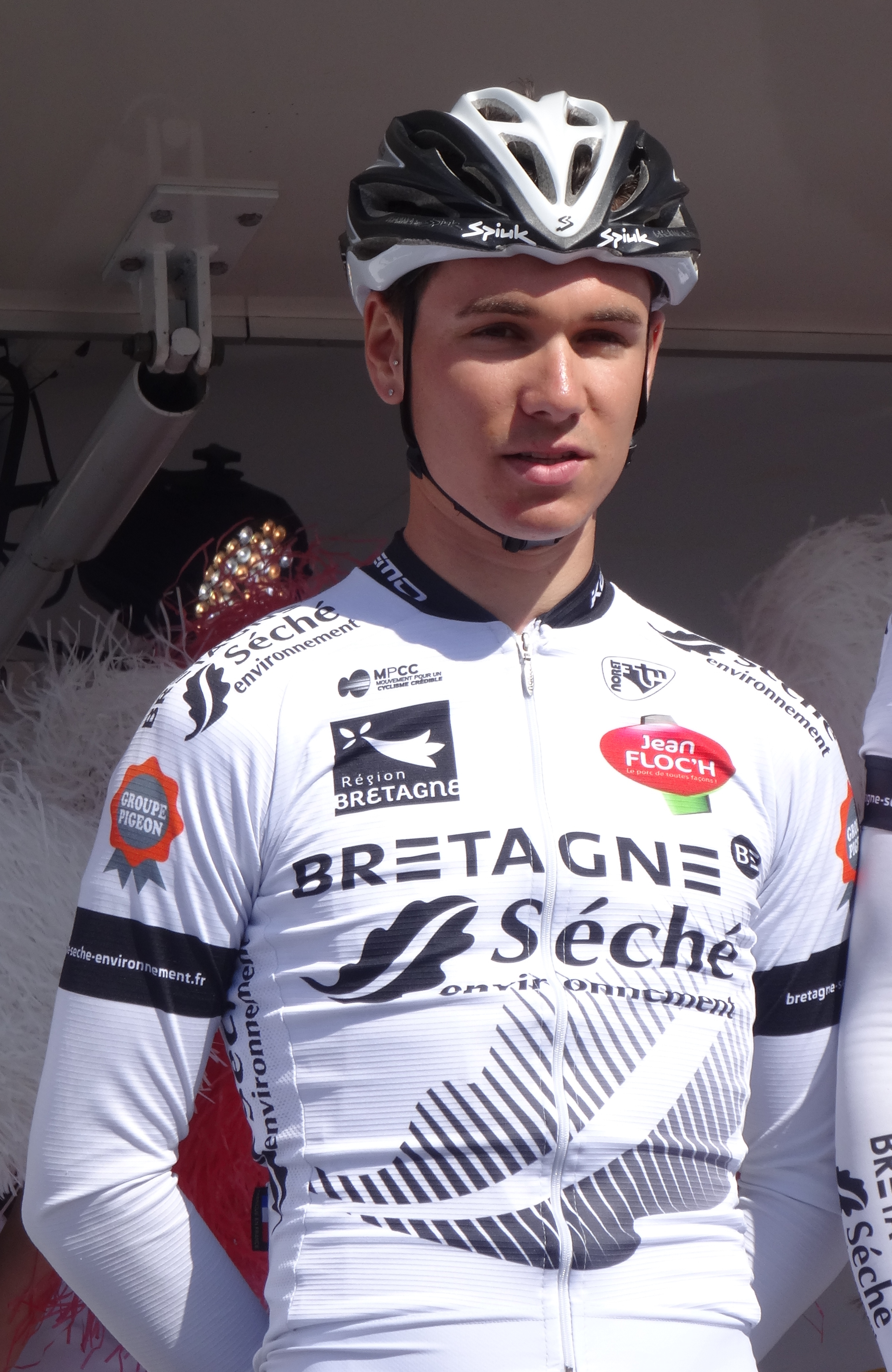 Reportage réalisé le jeudi 17 avril à l'occasion du départ et de l'arrivée du Grand Prix de Denain 2014 à Denain, Nord, Nord-Pas-de-Calais, France.